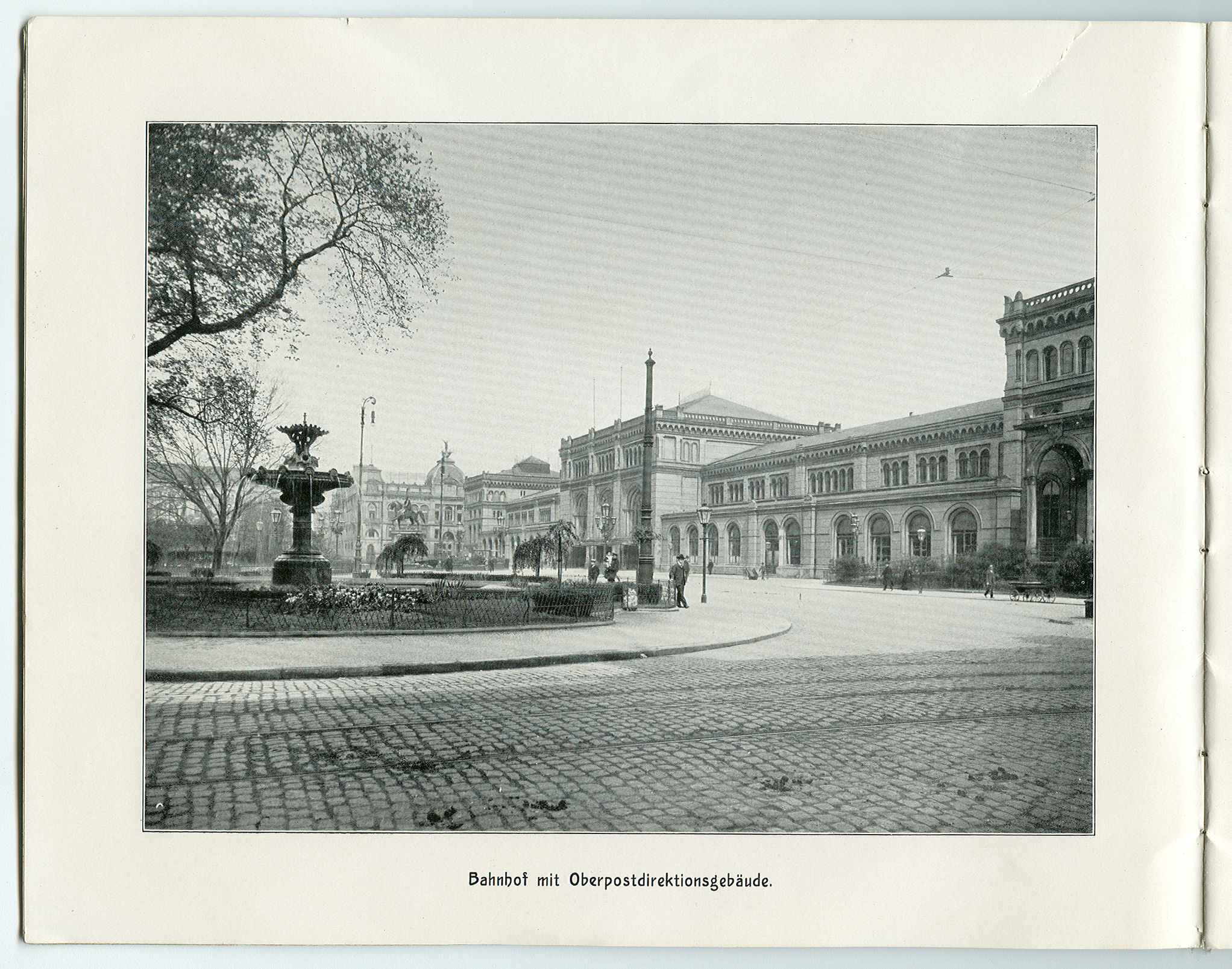 „Hannover – 26 Ansichten nach künstlerischen Aufnahmen“ von Karl F. Wunder. – Bahnhof mit Oberpostdirektionsgebäude.